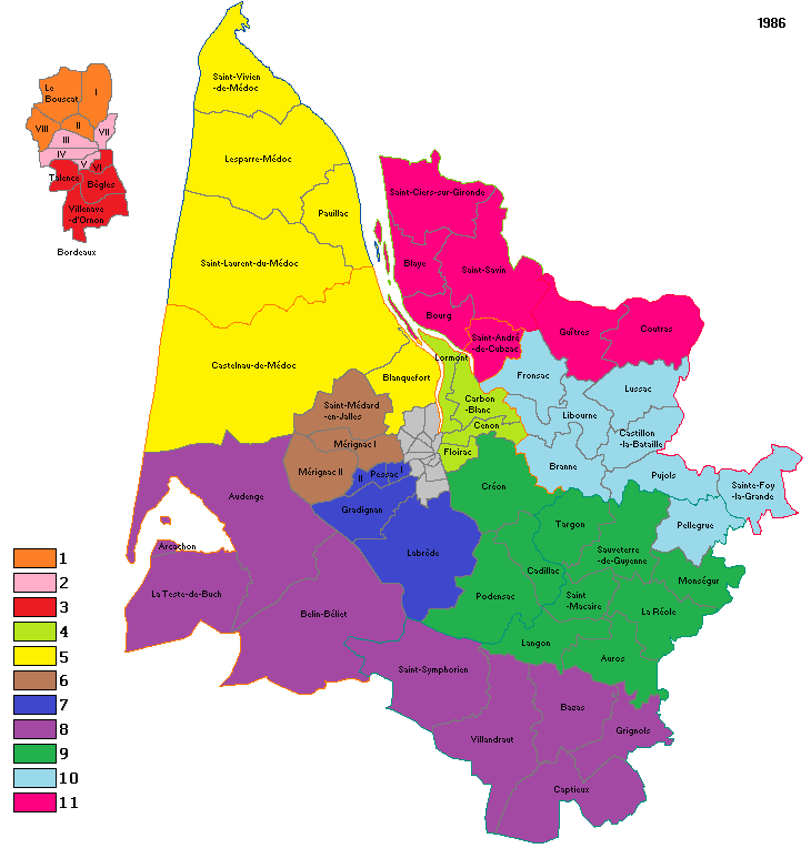 Circonscriptions de la Gironde en 1986